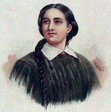 Dibujo (acuarela/papel) de Roberto Páramo Tirado, Ca. 1910. Hace parte de la donación de Eduardo Santos al Museo nacional de Colombia.